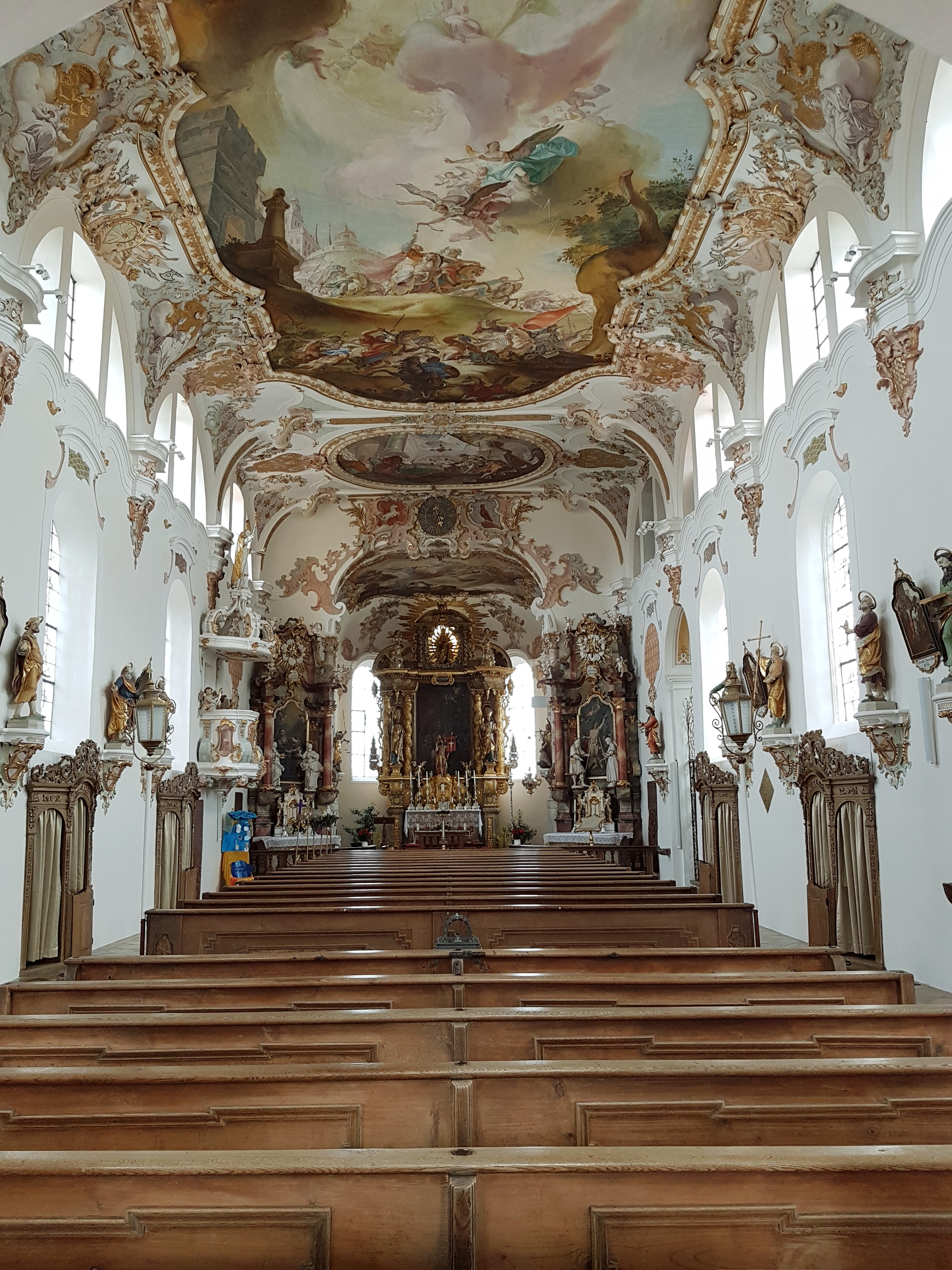 St. Ulrich (Eresing), Innenraum mit Blick zum Chor